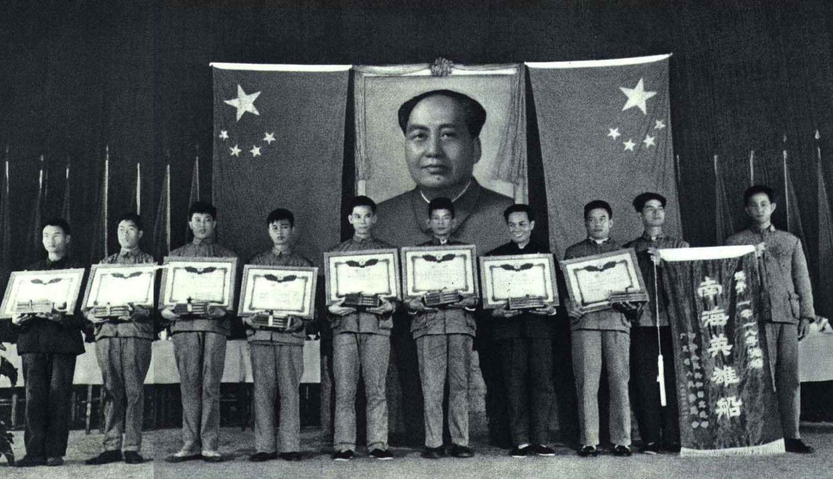 1967-06 1967年南海英雄船